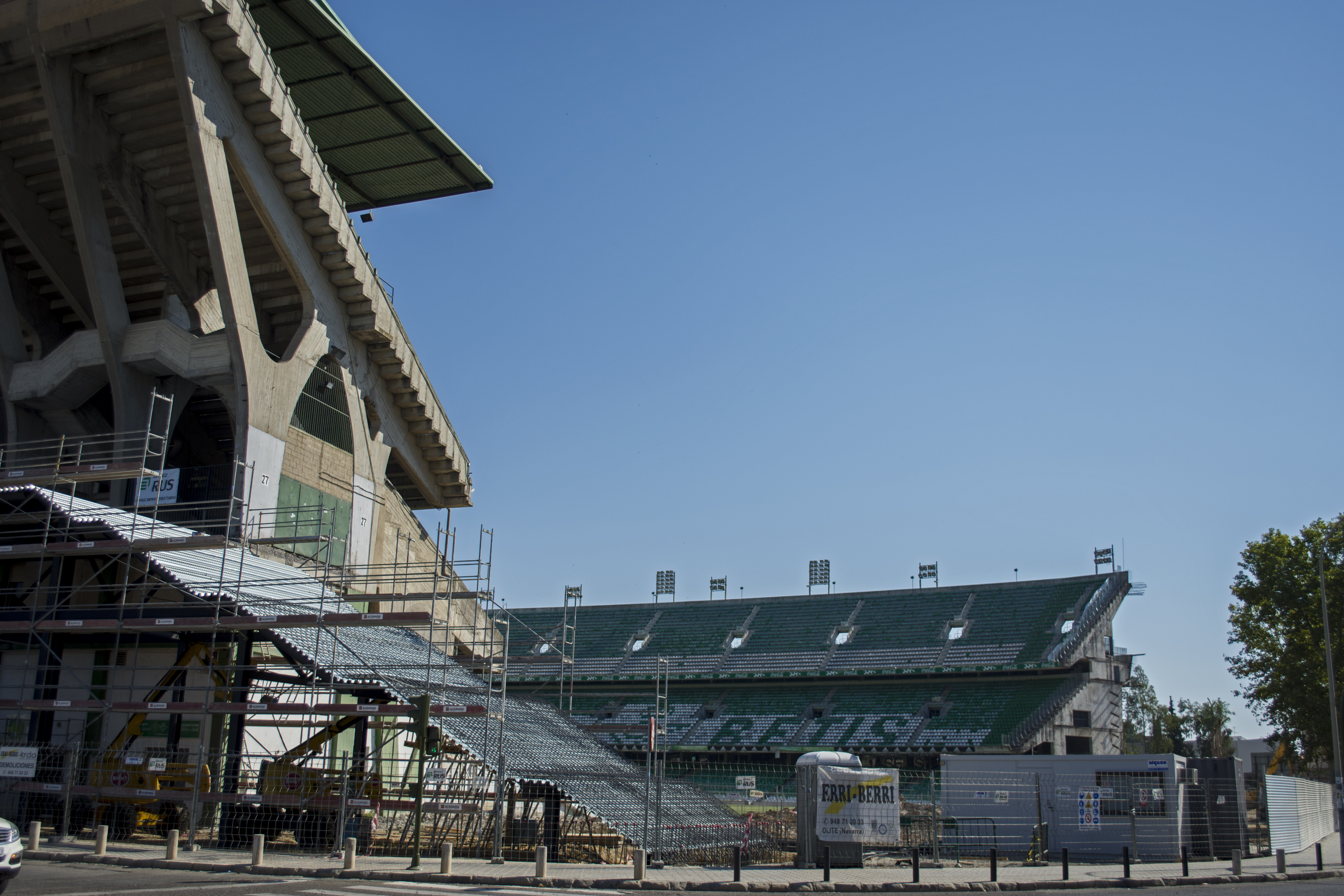 Estadio Benito Villamarín. Vista de la demolición de la zona de gol sur.